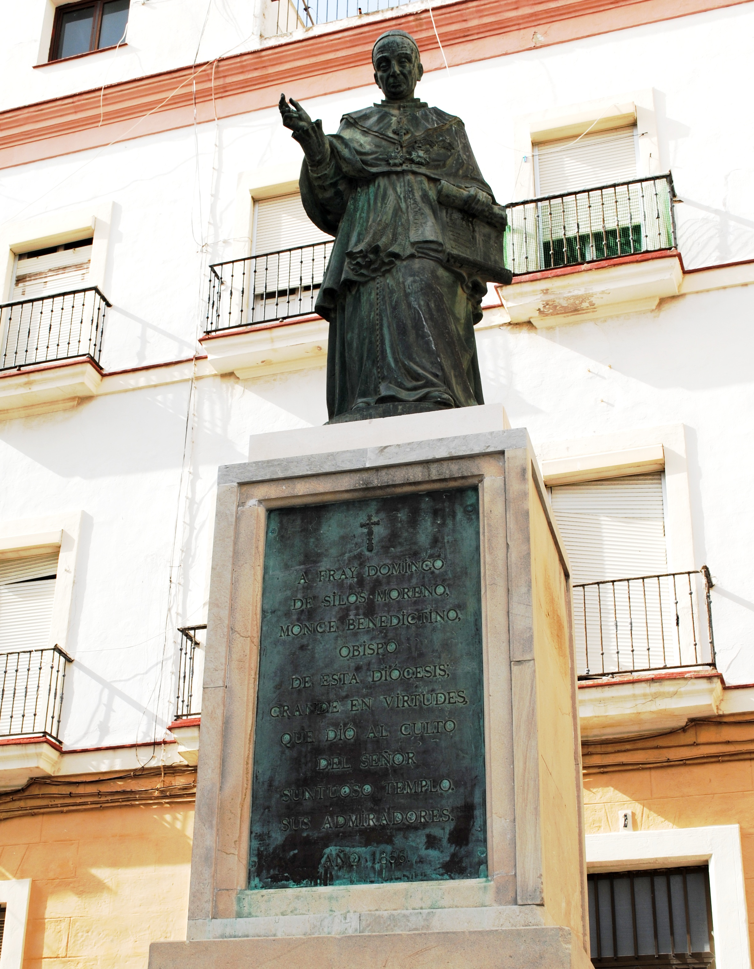 A Domingo de Silos Moreno, obispo de Cádiz.